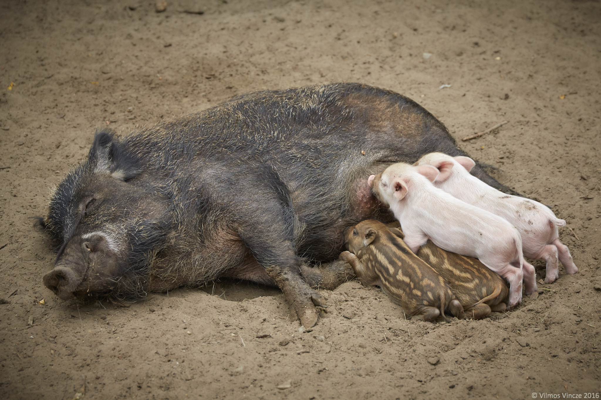 Vaddisznó koca a malacaival